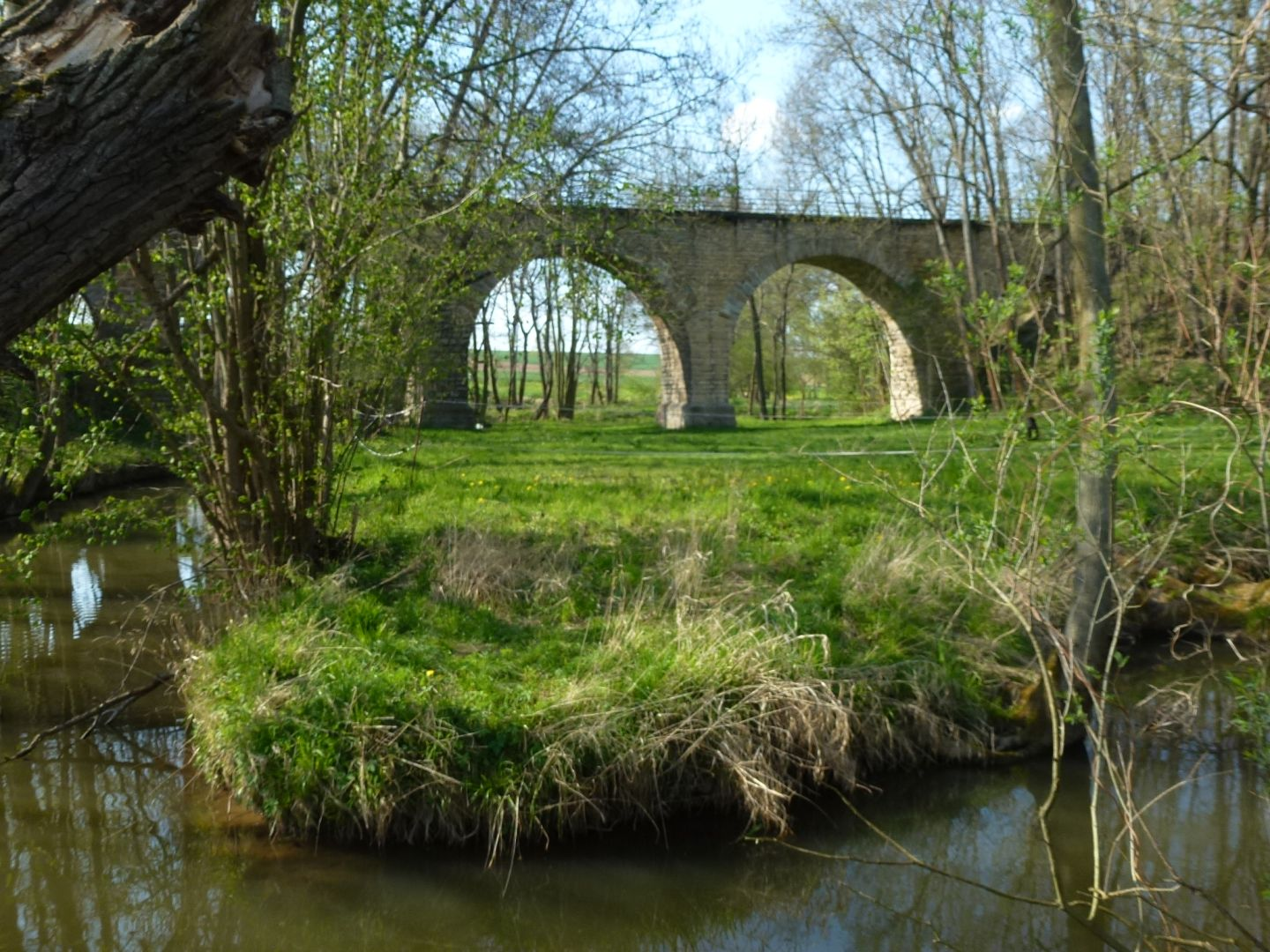 Viadukt der ehem. Bahnlinie bei Utenbach